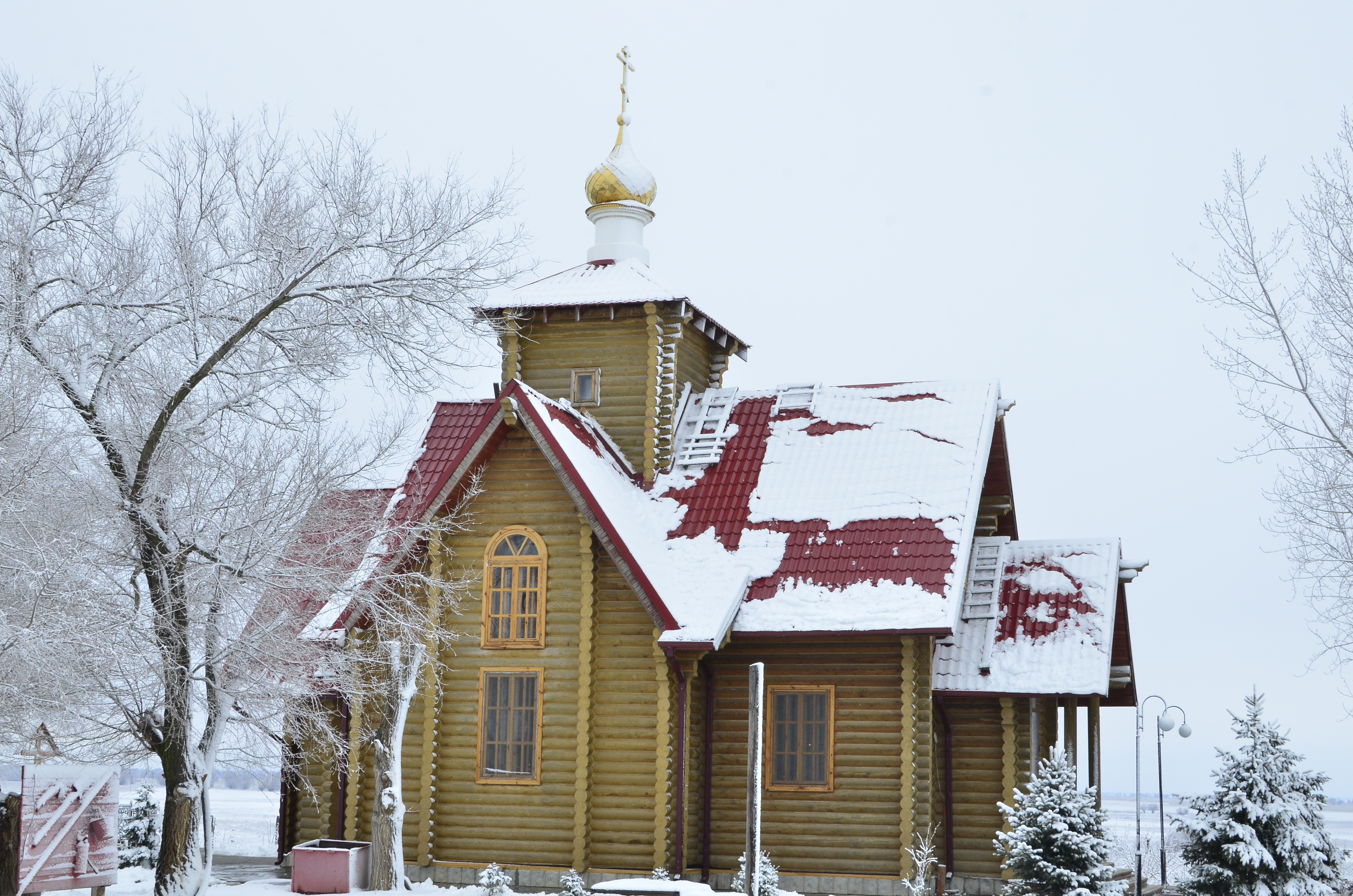 Володарский район Астраханской области